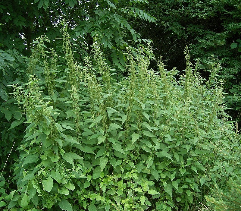 Urtica dioica